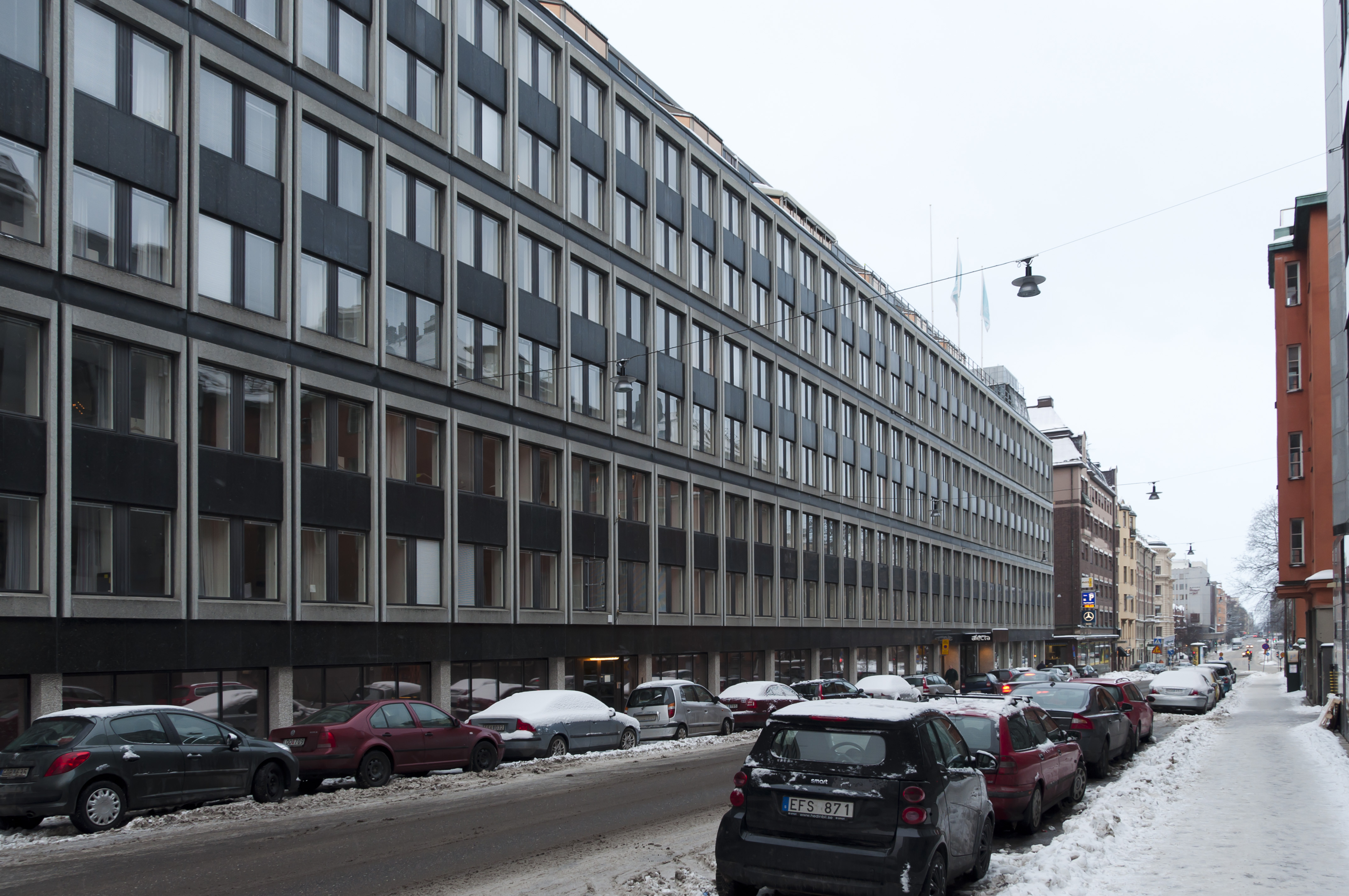 Regeringsgatan 105-107. Höjden 11. Byggnadsår 1963-65, arkitekt Carl-Evin Sandberg, byggherre AB Skånska Cementgjuteriet.